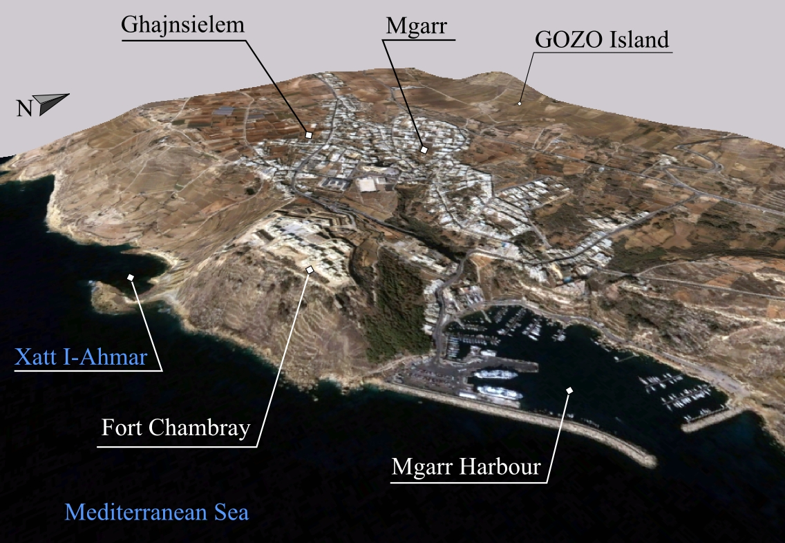 Prelucrare 3D pentru Mgarr, GOZO.